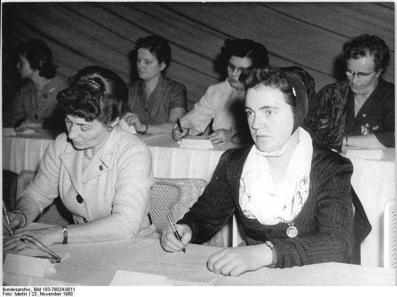 Zentralbild 23.11.1960 VII. Bundeskongress des DFD. 1. Tag In der festlich geschmückten Berliner Dynamo-Sporthalle wurde am 23.11.1960 der VII. Bundeskongress des Demokratischen Frauenbundes Deutschlands eröffnet. An dieser Tagung der größten Frauenorganisation in der Geschichte Deutschlands nehmen weit über 1.400 Delegierte und Gäste teil. Die Bedeutung des Kongresses wird durch die Anwesenheit von Vertreterinnen der Internationalen Frauenbewegung aus 17 Ländern der Erde unterstrichen. Der dreitägige Kongress wird sich mit dem Beitrag der Frauen und Mütter im Kampf zur Sicherung des Friedens und zum Aufbau des Sozialismus in der DDR beschäftigen. UBz: Erika Lenz, Innenarchitektin aus Leipzig (links) und Agnes Jannack, Pionierleiterin in Cölln-Kreis Bautzen, während der Tagung im Präsidium. (Martin)